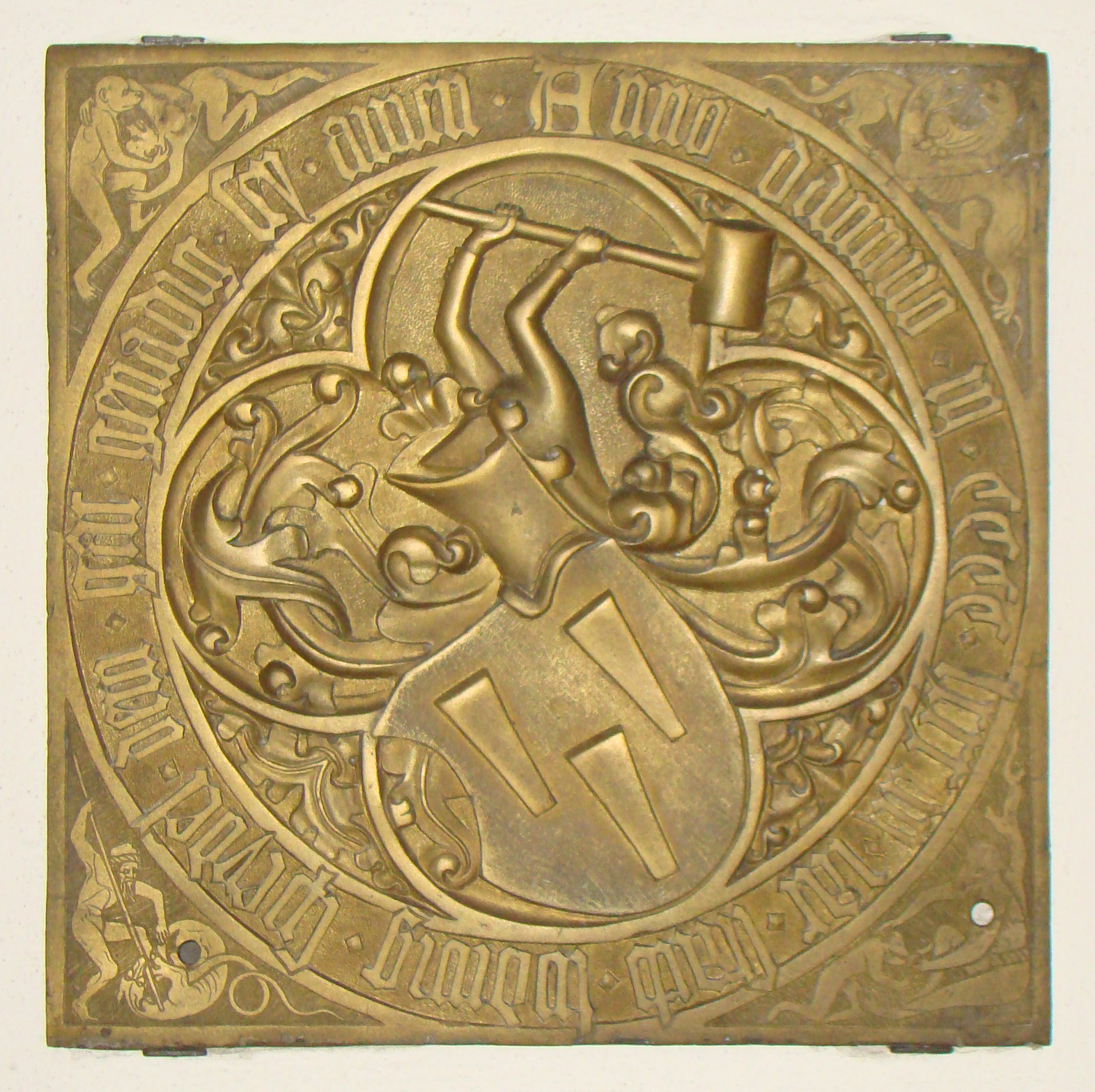 Deutschordensmünster in Heilbronn: Bronzenes Epitah zum Andenken an Ludwig Speydel, der für seinen Todesfall die nach im benannte zweistöckige Speydel-Kapelle mit Marienaltar gestiftet hatte. Diese wurde an der Nordseite des Chores des Deutschordensmünsters angebaut.